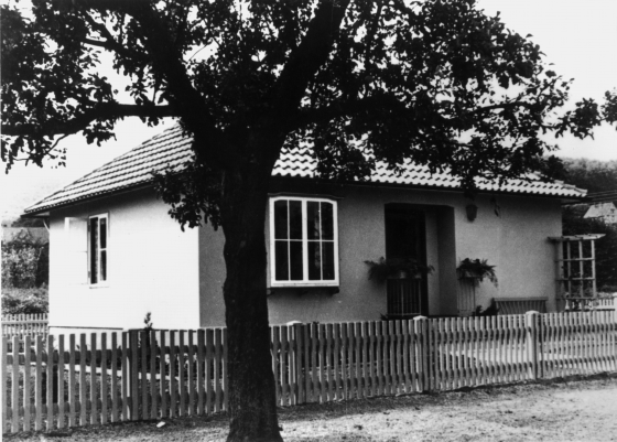 Das erste OKAL Fertighaus wurde 1959 in Lauenstein gebaut